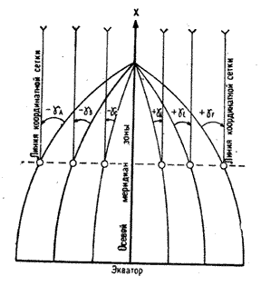 Template:Файл